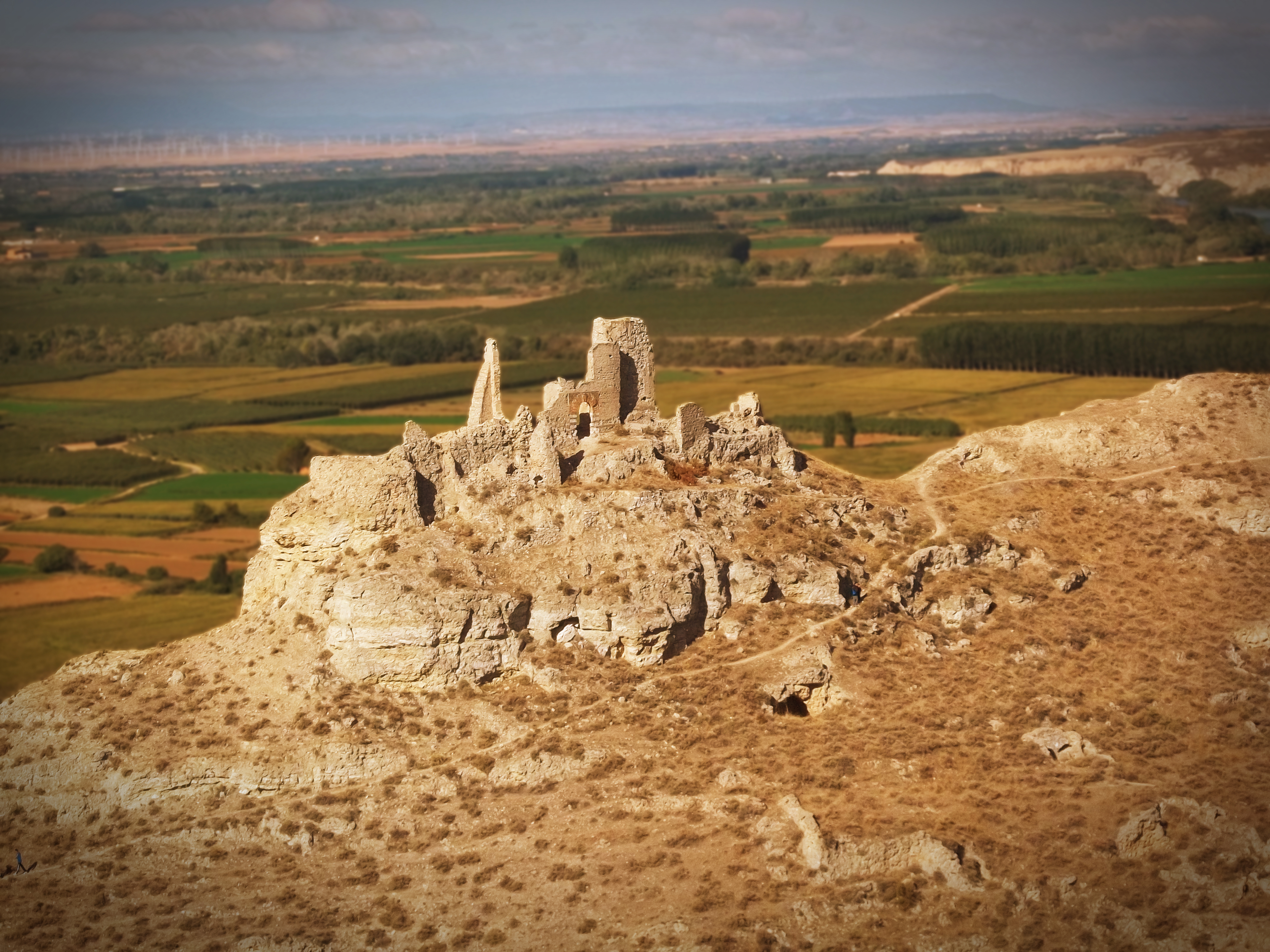 Visión general desde la cumbre del Molino